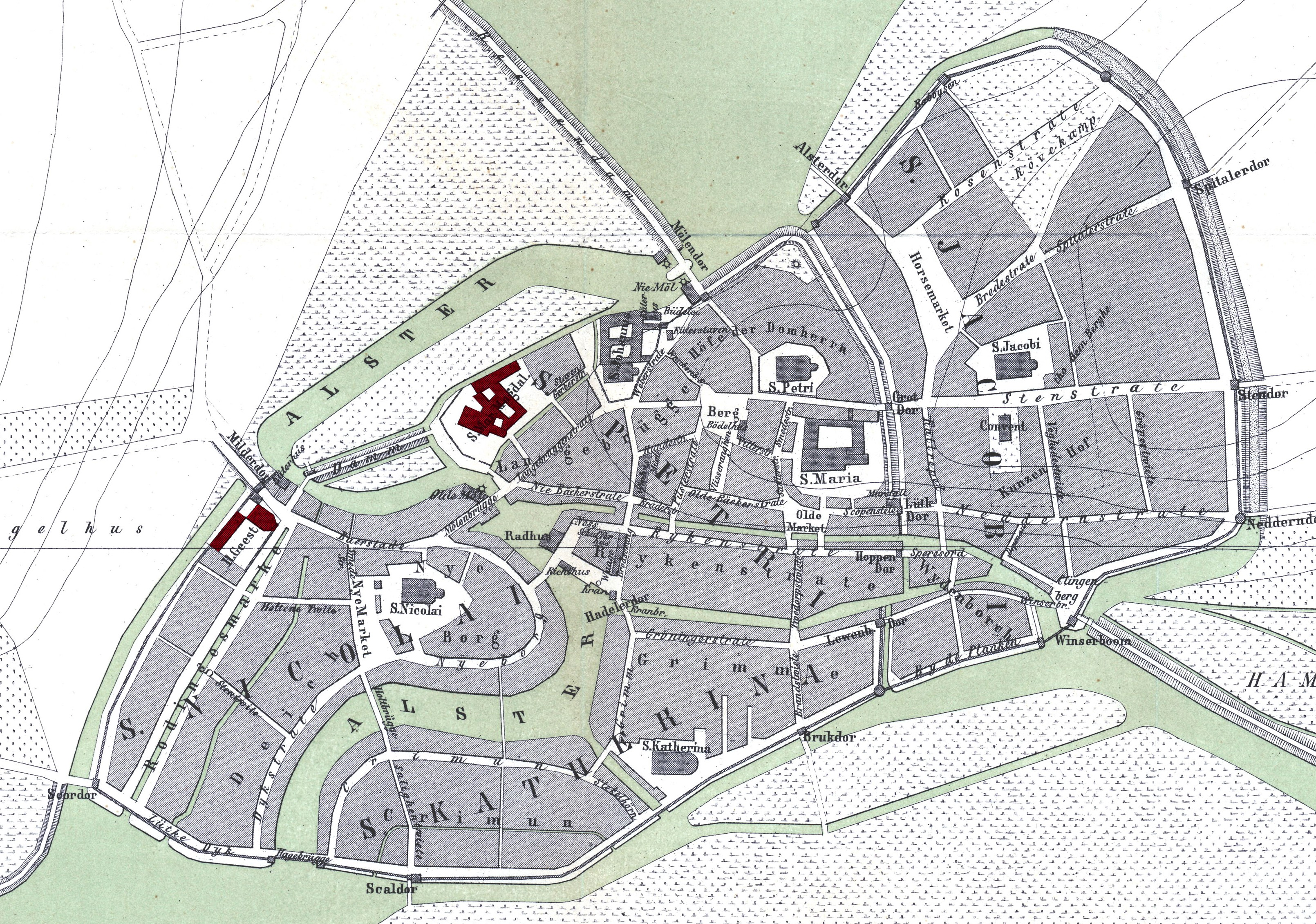 Karte des rekonstruierten Grundrisses von Hamburg im Jahre 1320; Hospital zum Hl. Geist und Maria-Magdalenen-Kloster rot hervorgehoben